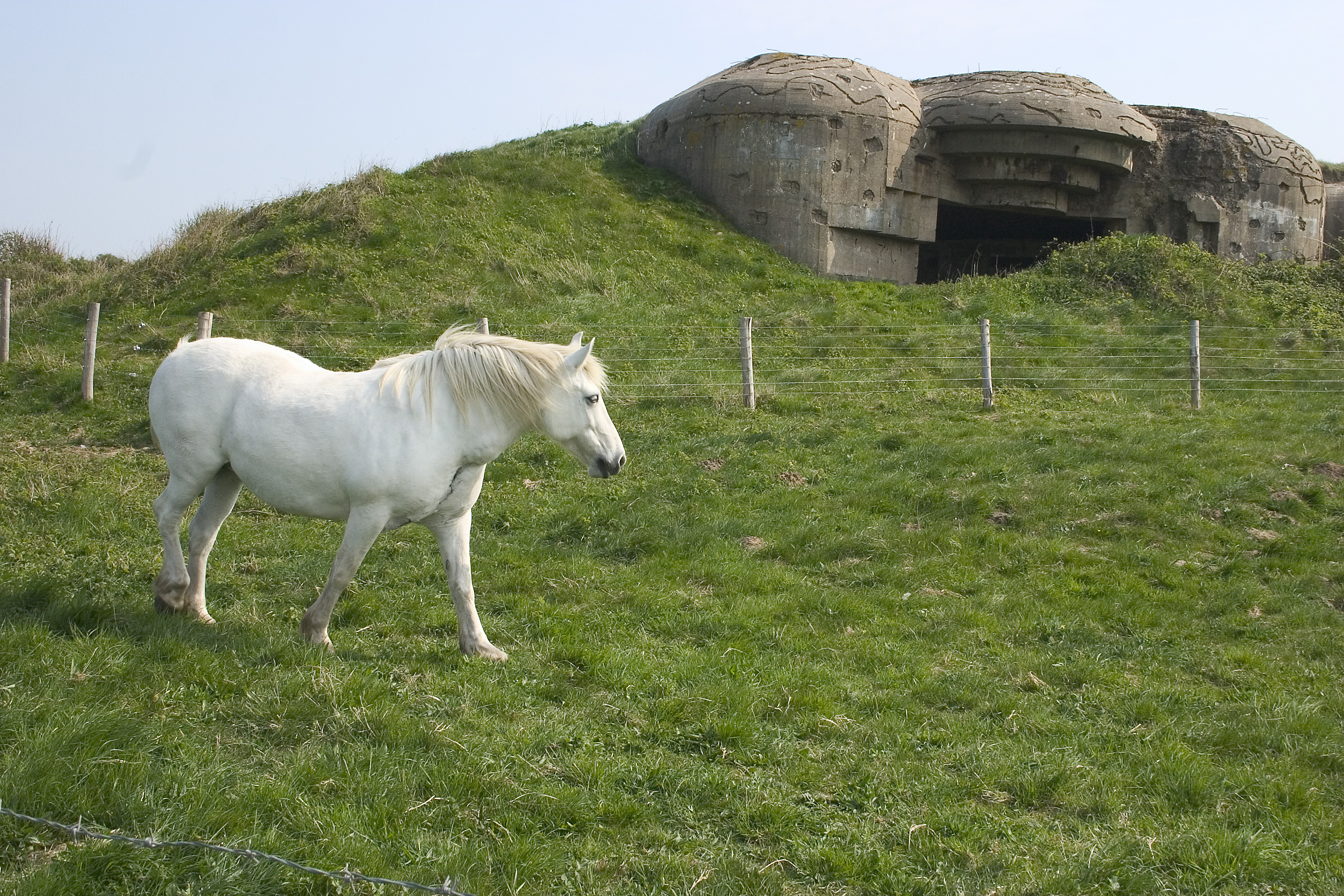 Fort de la crèche à Wimereux, le blockhaus sert d'abri à un cheval Boulonnais